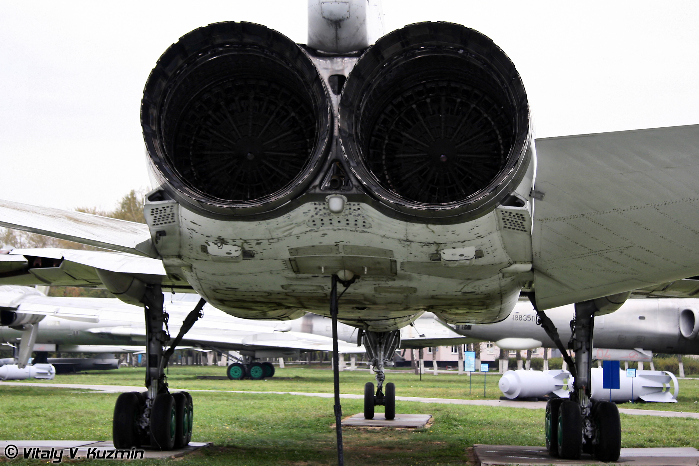 Ту-22М3 (Tu-22M3 Backfire-C)